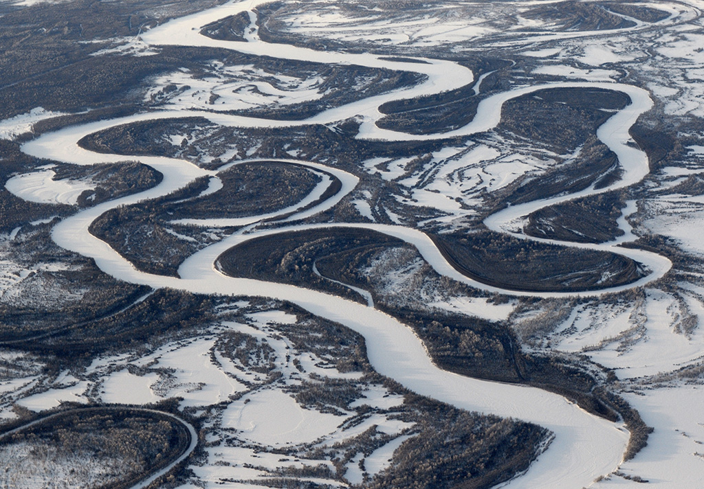 Меандры реки Камчатка